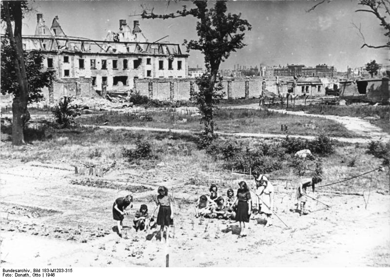 ADN-ZB/Donath Berlin 1946: Von dem Gelände der ehemaligen "Ministergärten" zwischen Voßstraße und Brandenburger Tor hat eine Gärtnerinnenschule einen Teile zur Bepflanzung erhalten.